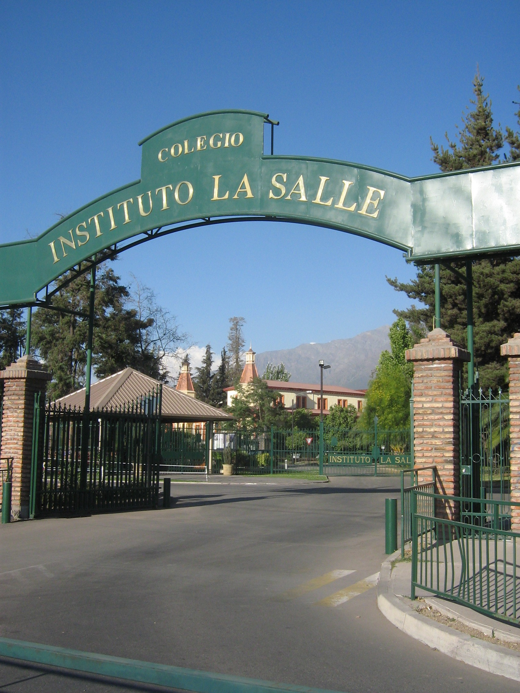 La Salle College, La Florida, Santiago, Chile